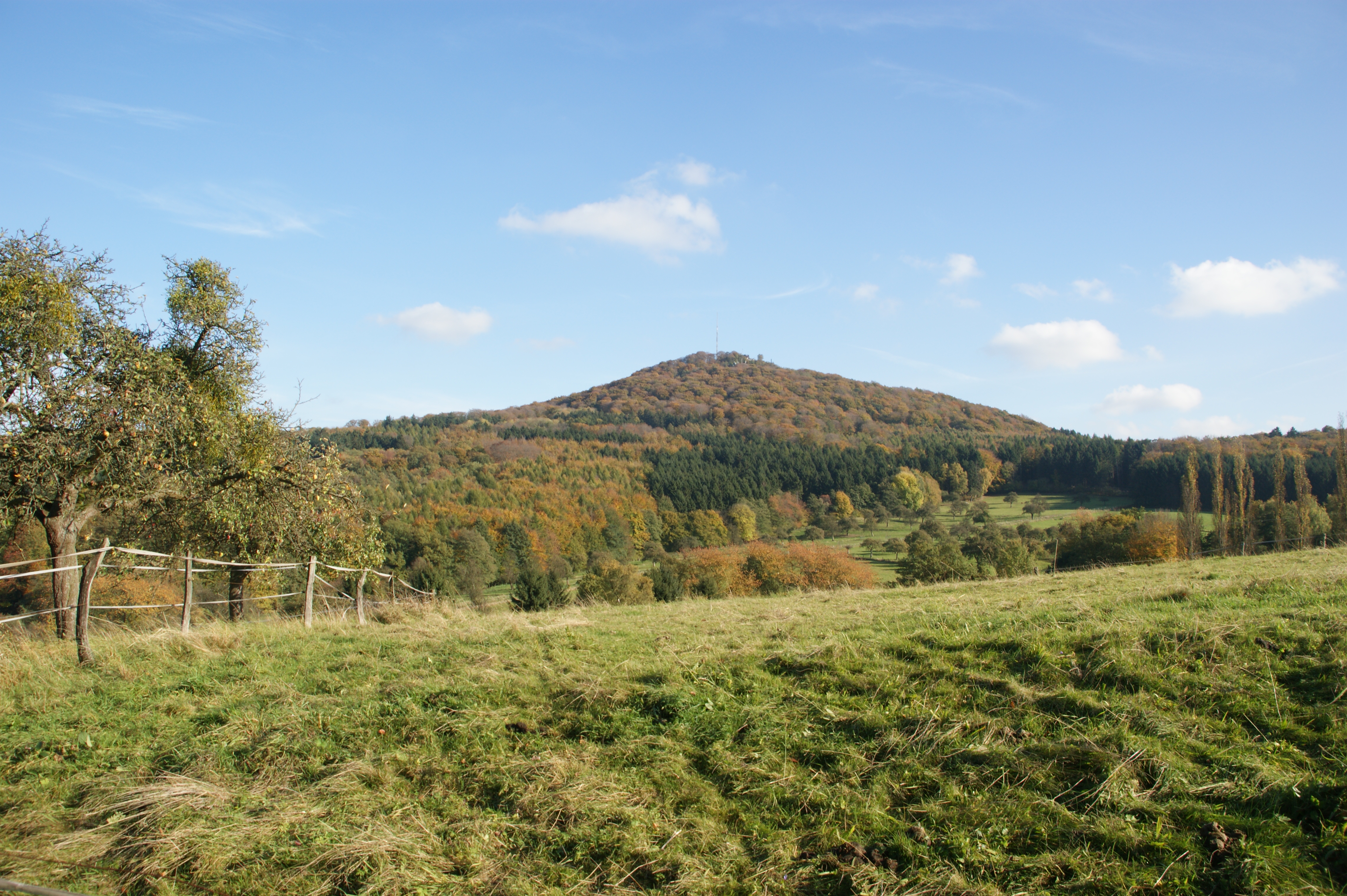 Siebengebirge, Großer Ölberg